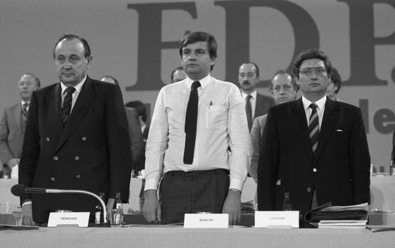 29.-30.01.1983 Außerordentlicher Bundesparteitag der FDP in der Stadthalle Freiburg.